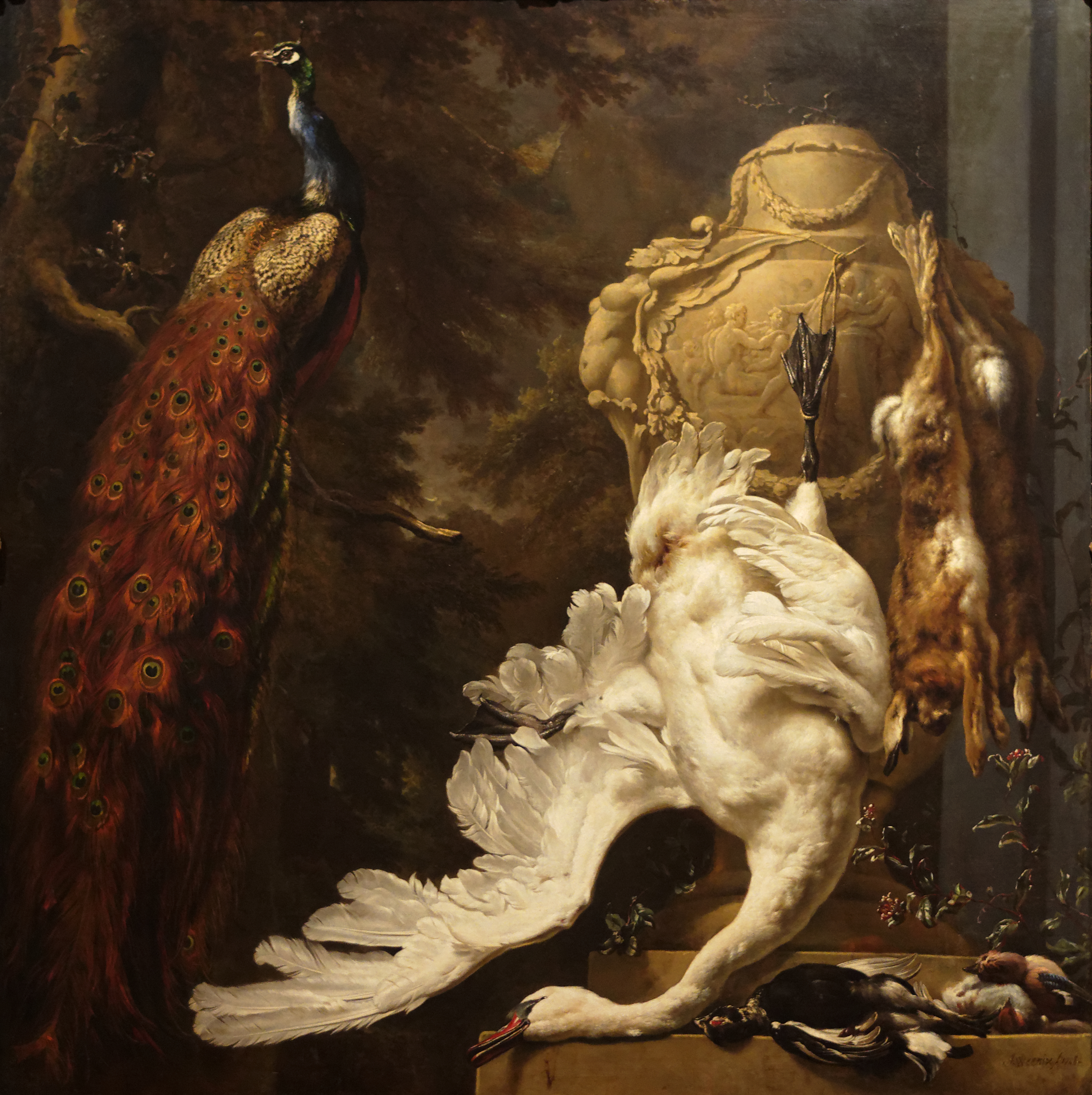 Paon et trophées de chasse. Hollande 1708. Exposée au musée Calouste Gulbenkian. Inv 454.